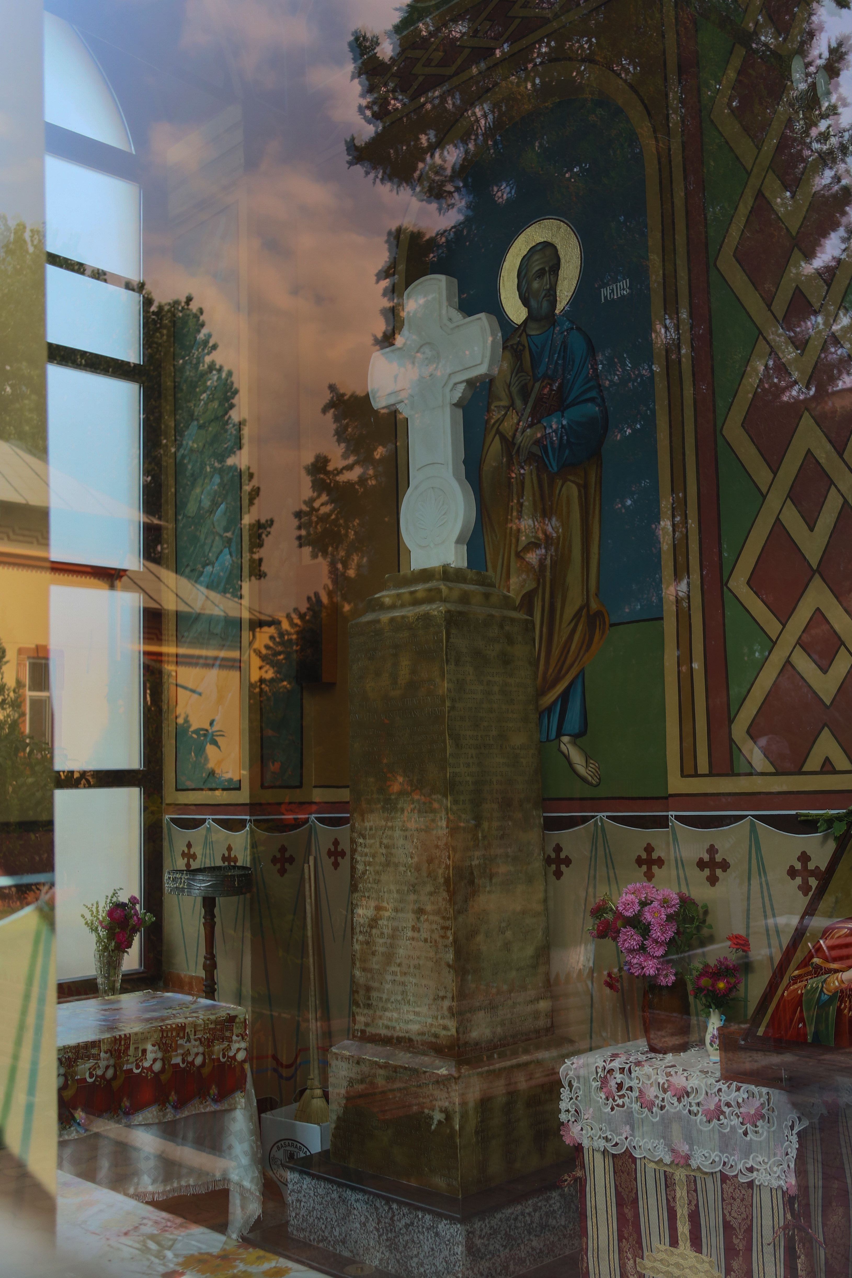 Cruce de piatră 02